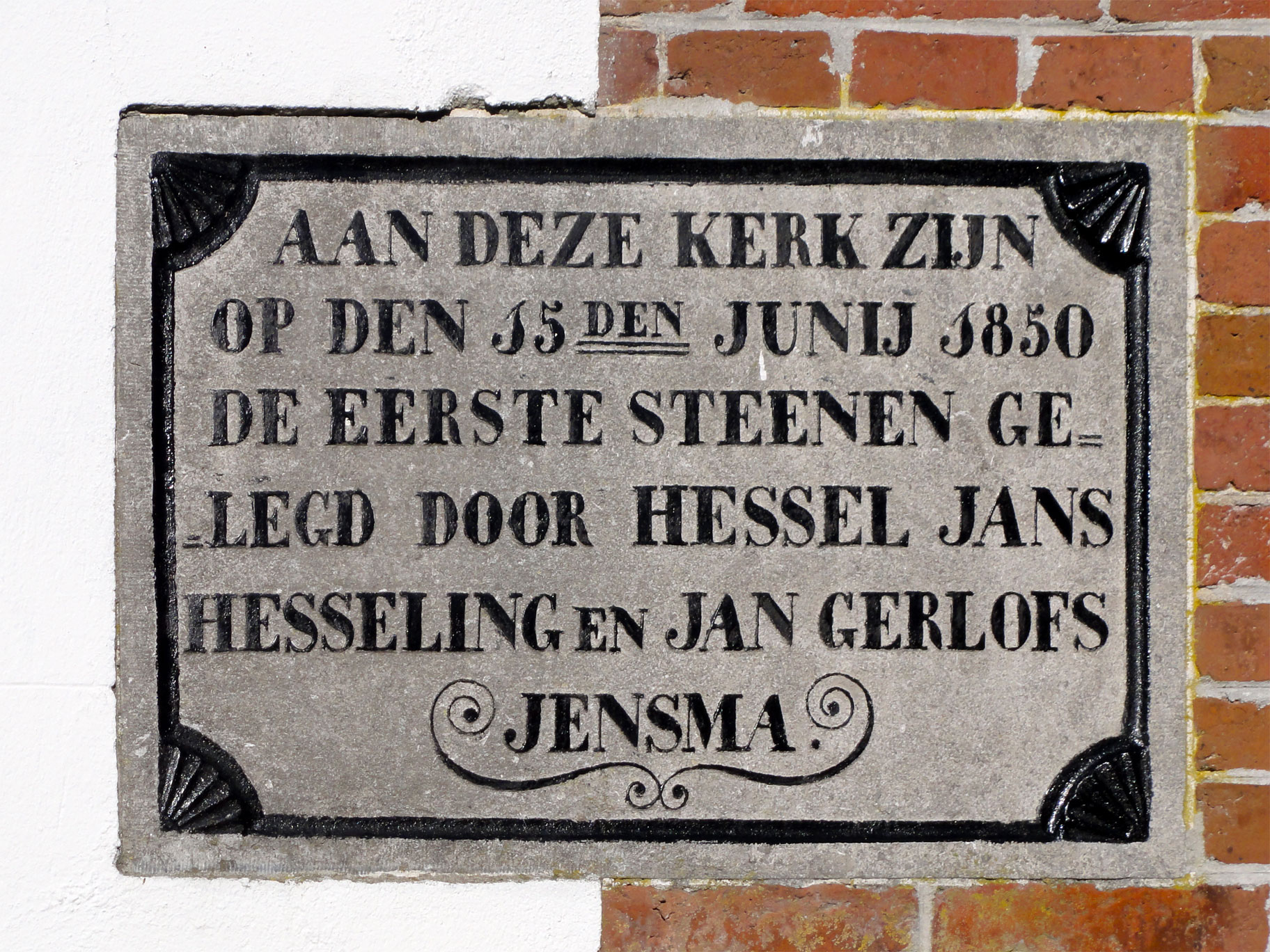 Doopsgezinde kerk van Holwerd, rijksmonument